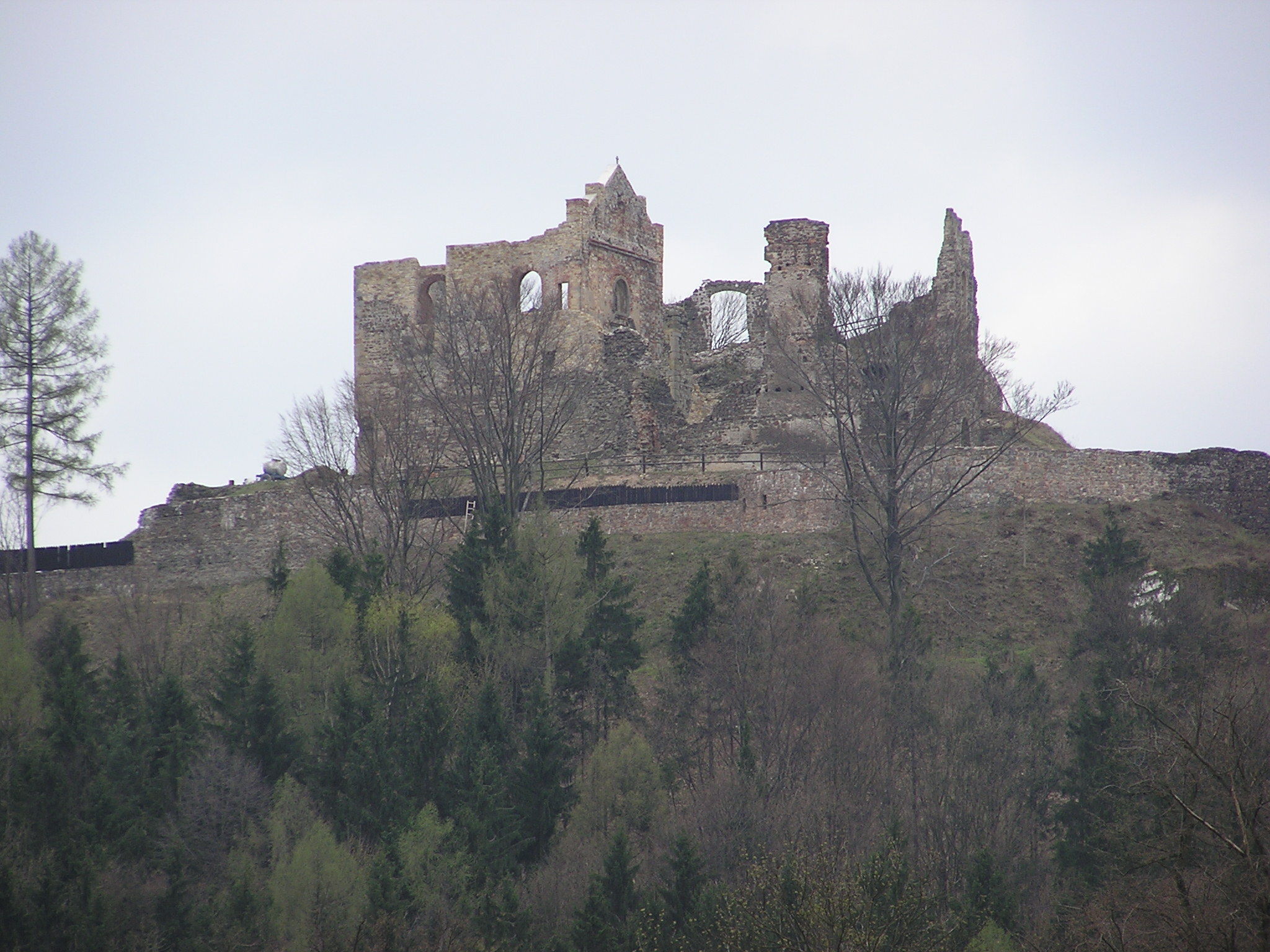 Zříceina Potštejn